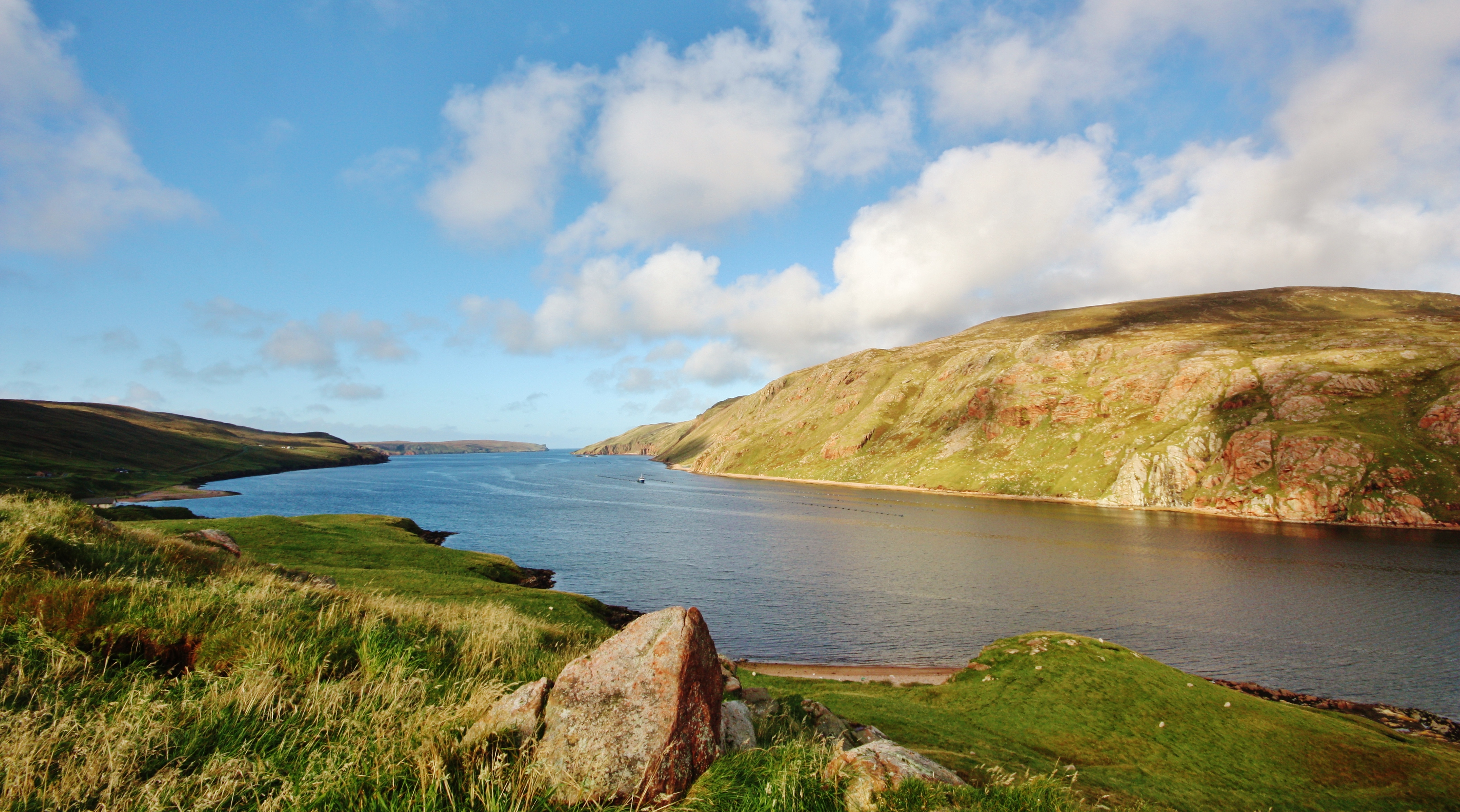 Ronas Voe IMG_4459